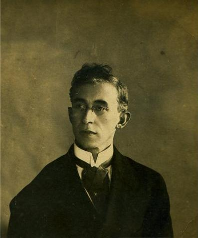 Pessoa trajando terno escuro